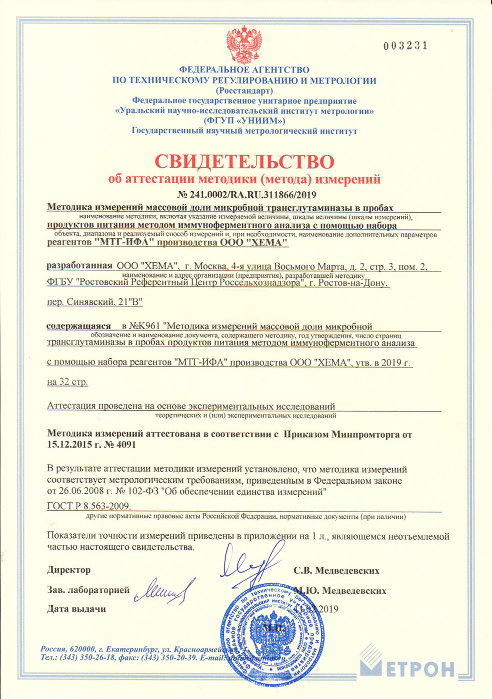 ООО «ХЕМА», российский производитель реагентов для научных исследований в различных областях, аттестовало разработанную методику измерений массовой доли микробной трансглутаминазы (мТГ) в пробах продуктов питания методом иммуноферментного анализа (ИФА) с помощью набора реагентов «МТГ-ИФА» производства компании.